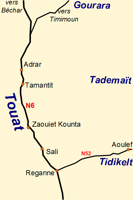 Région du Touat, Algérie (Villes du Touat)